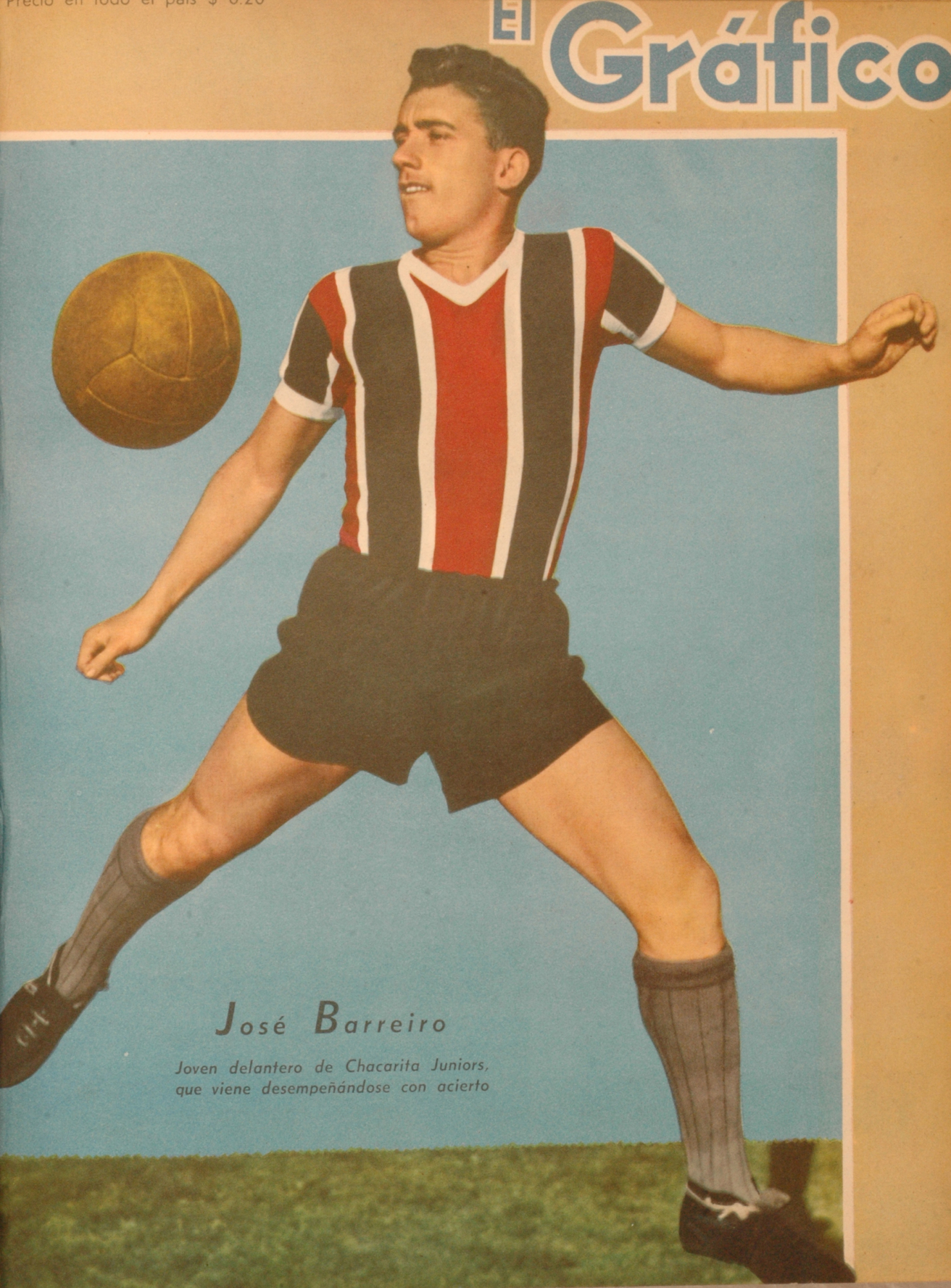 El Grafico del 27 de Agosto de 1943. Edicion 1259